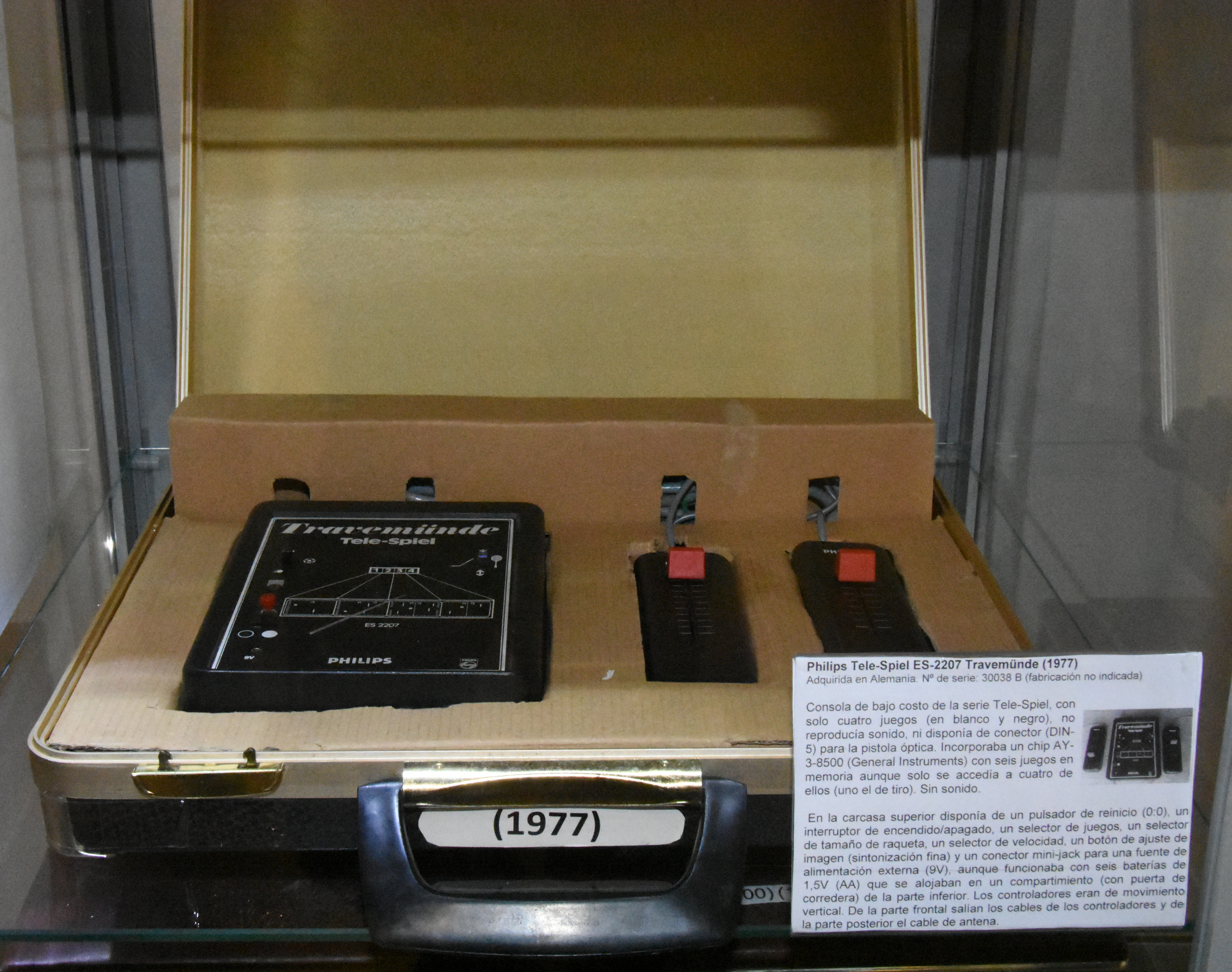 Philips Tele-Spiel ES-2207 Travemunde. Pong console, 1977 [Fotos por cortesía de Fernando Sáenz]